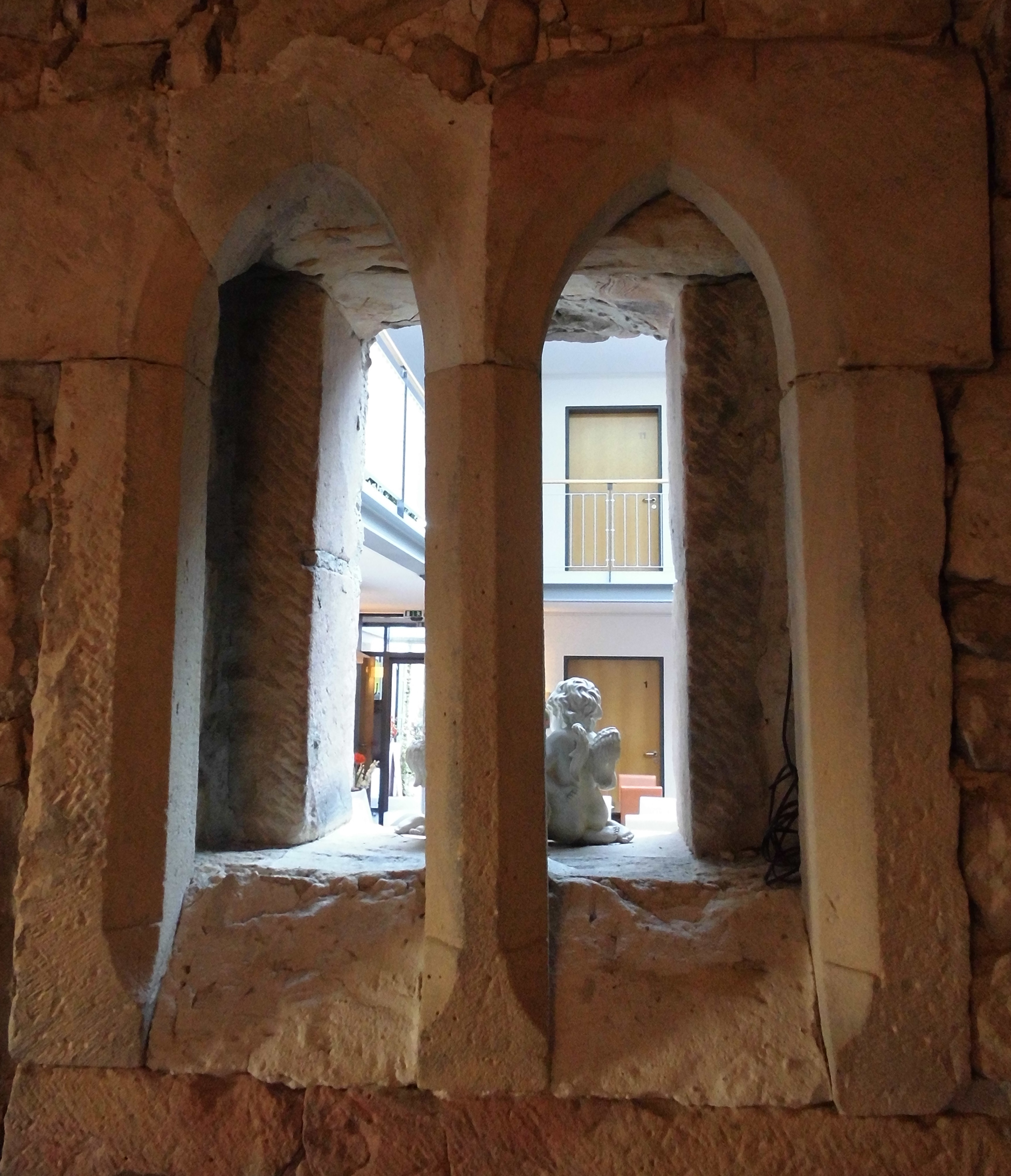 Gotisches Fenster im Gebäude Weinstraße 35